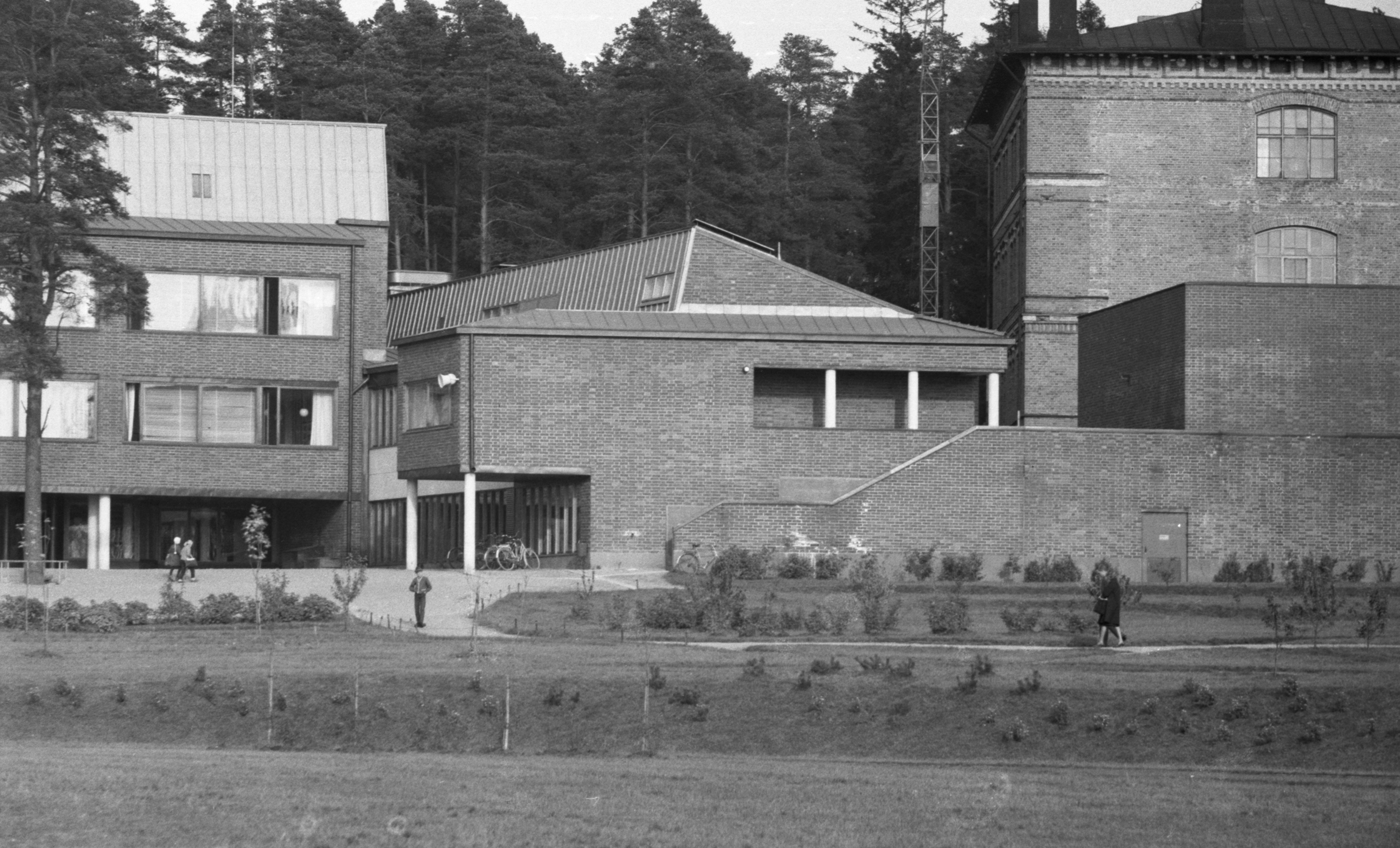 Maisema korkeakoulualueelta (panoraama).